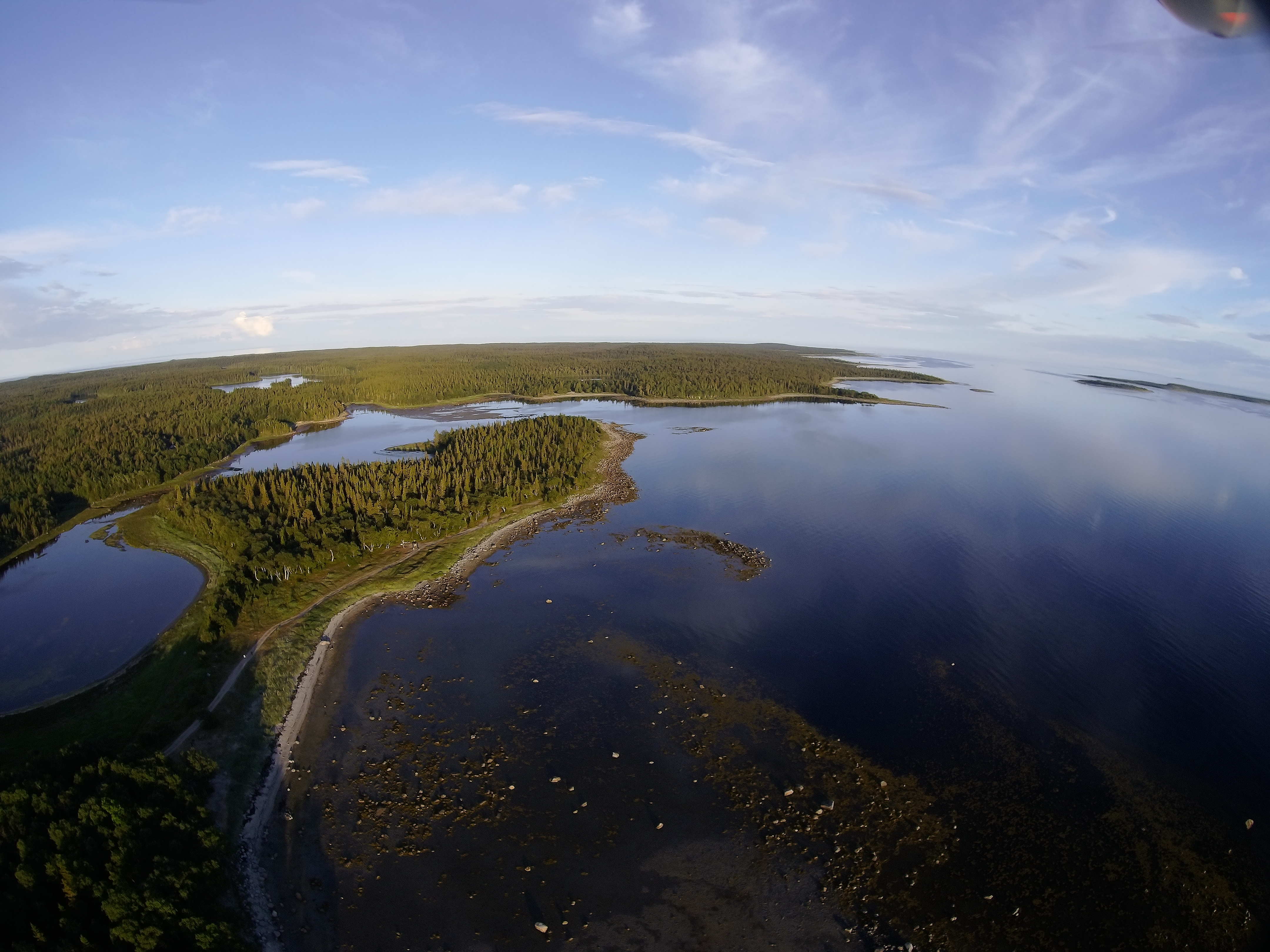 Бухта Кислая